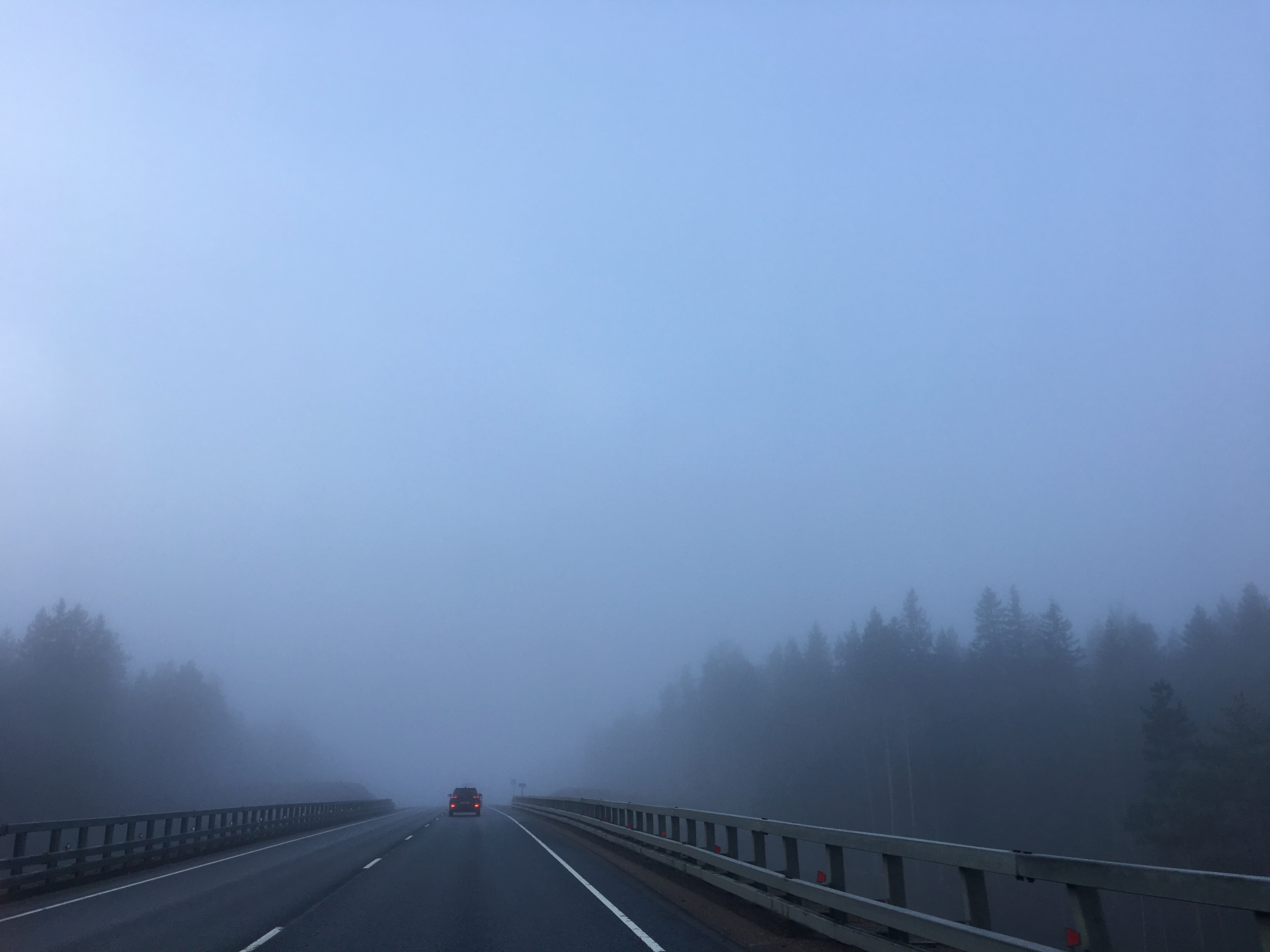 Е18 Скандинавия